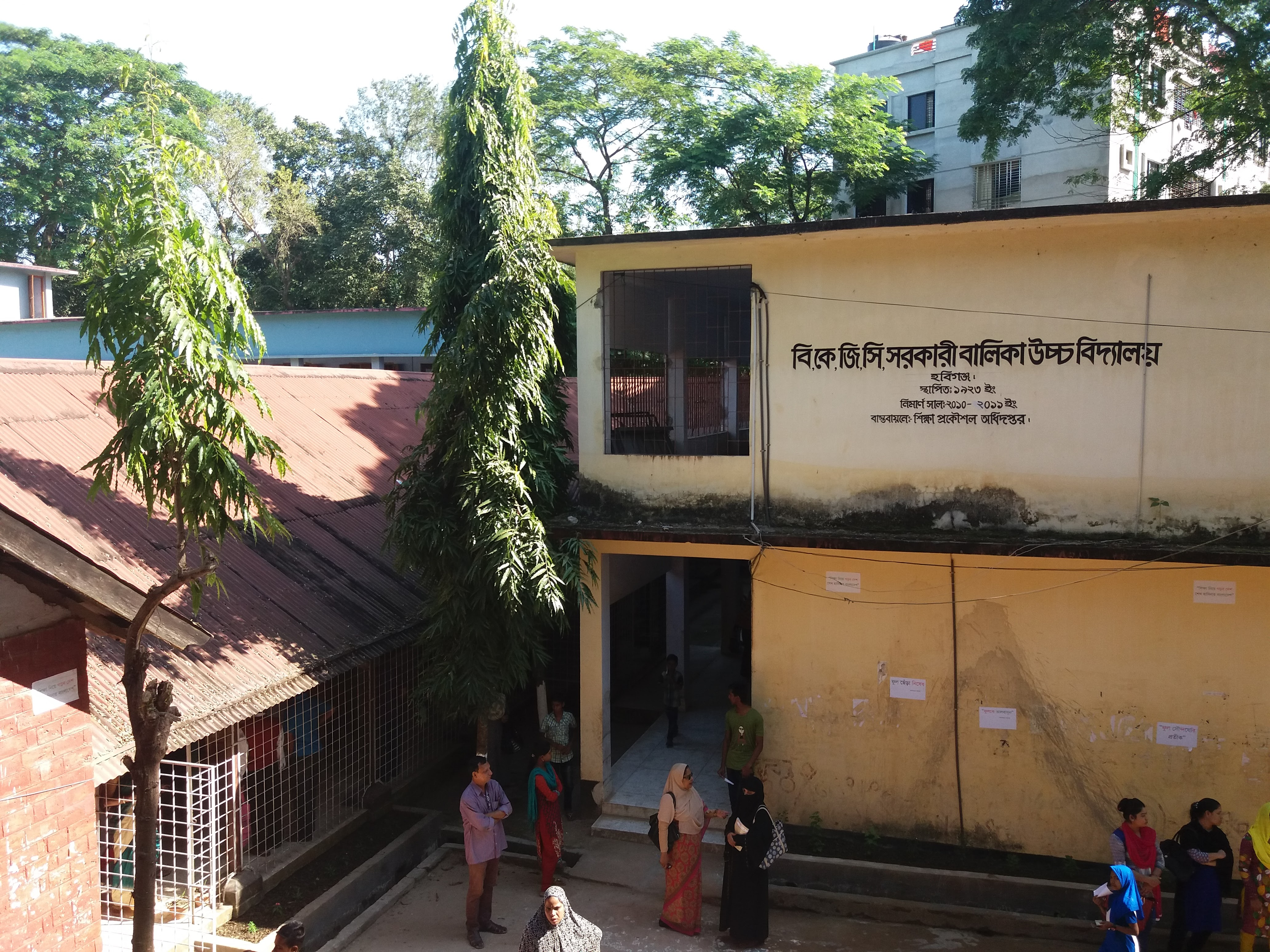 সামনের বহুতল ভবনের একাংশ